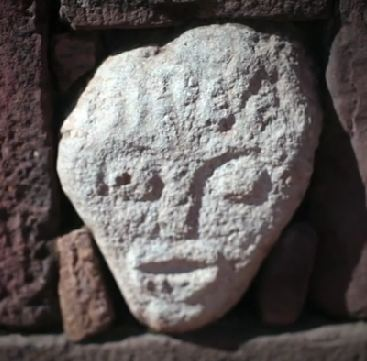 غغغ